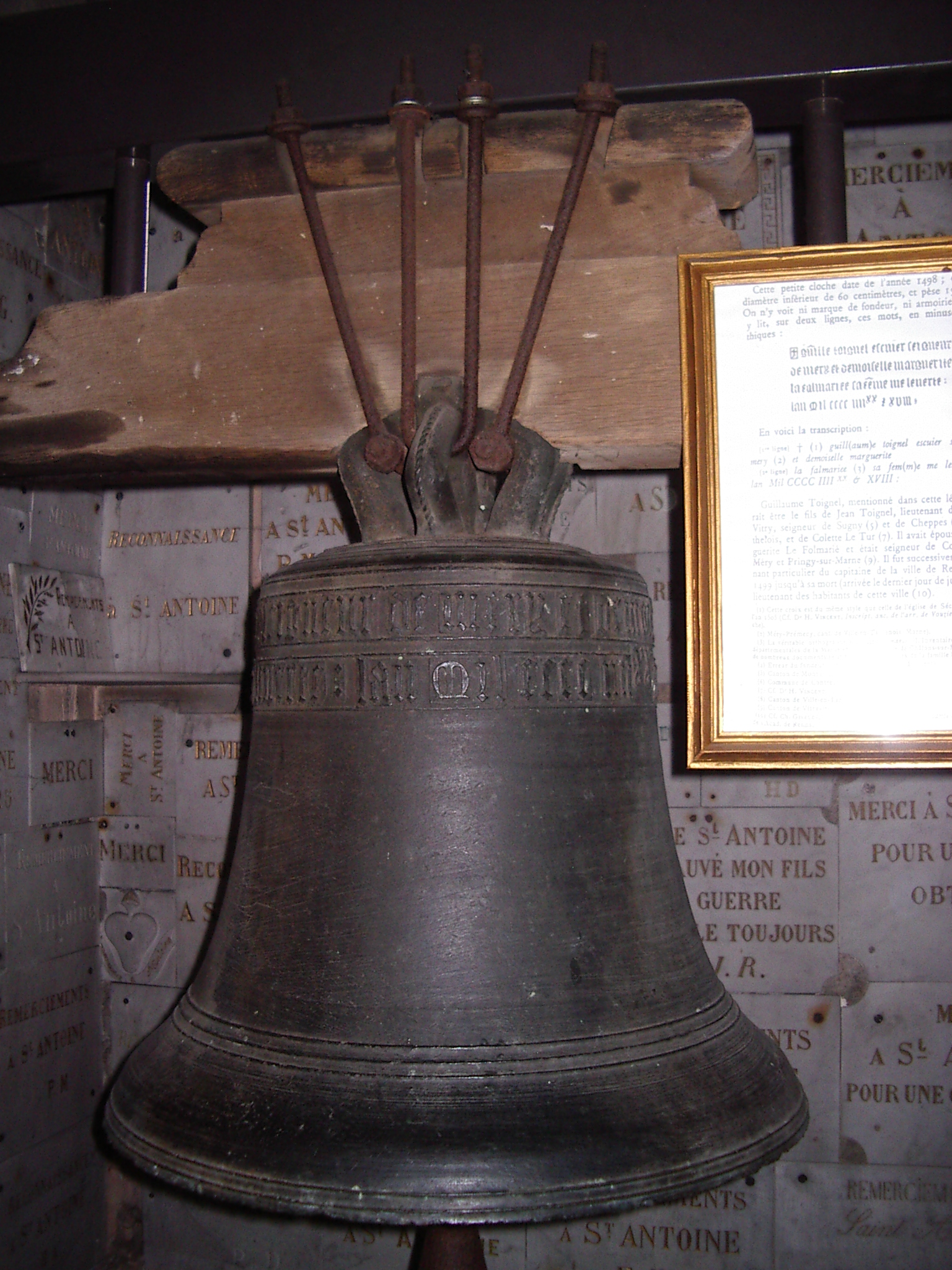 Ancienne cloche conservée dans l'église Saint-Antoine des Hauts-Buttés